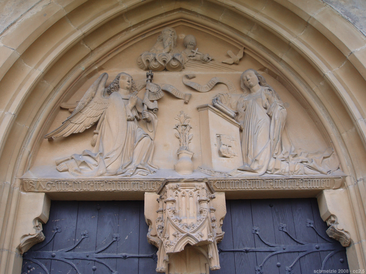 Cornelienkirche in Bad Wimpfen, Tympanon des Nordportals